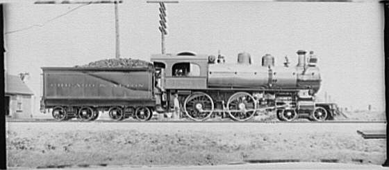 Loktype "American" Locomotive number 501 and tender, Chicago & Alton railroad CREATED/PUBLISHED: [1900] Die Urheberrechts-Schutzdauer für dieses Bild ist abgelaufen, es ist somit gemeinfrei („public domain“).